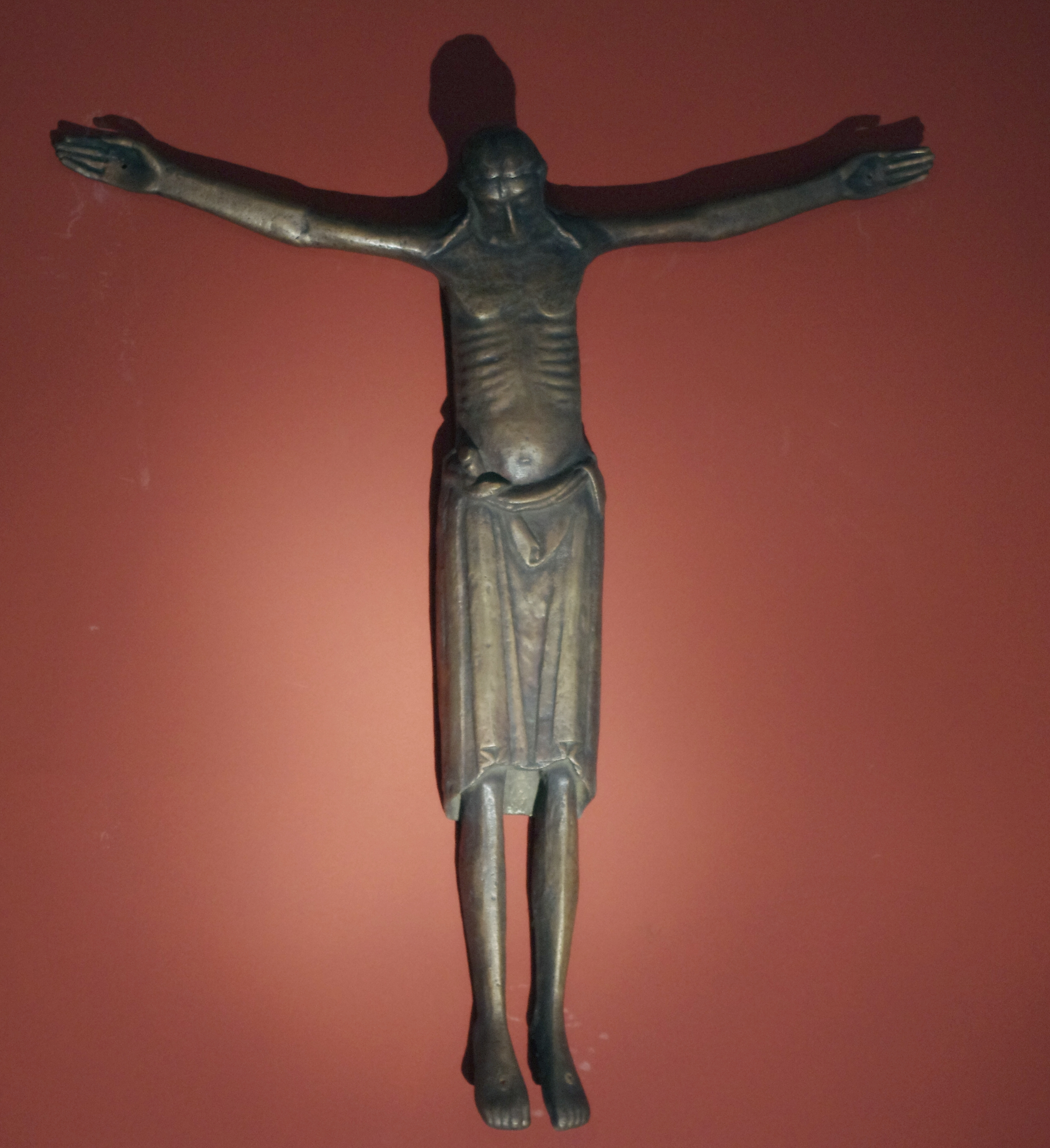 Kruzifixus des Helmstedter Kreuzes (Kopie, da Original beim Restaurateur)